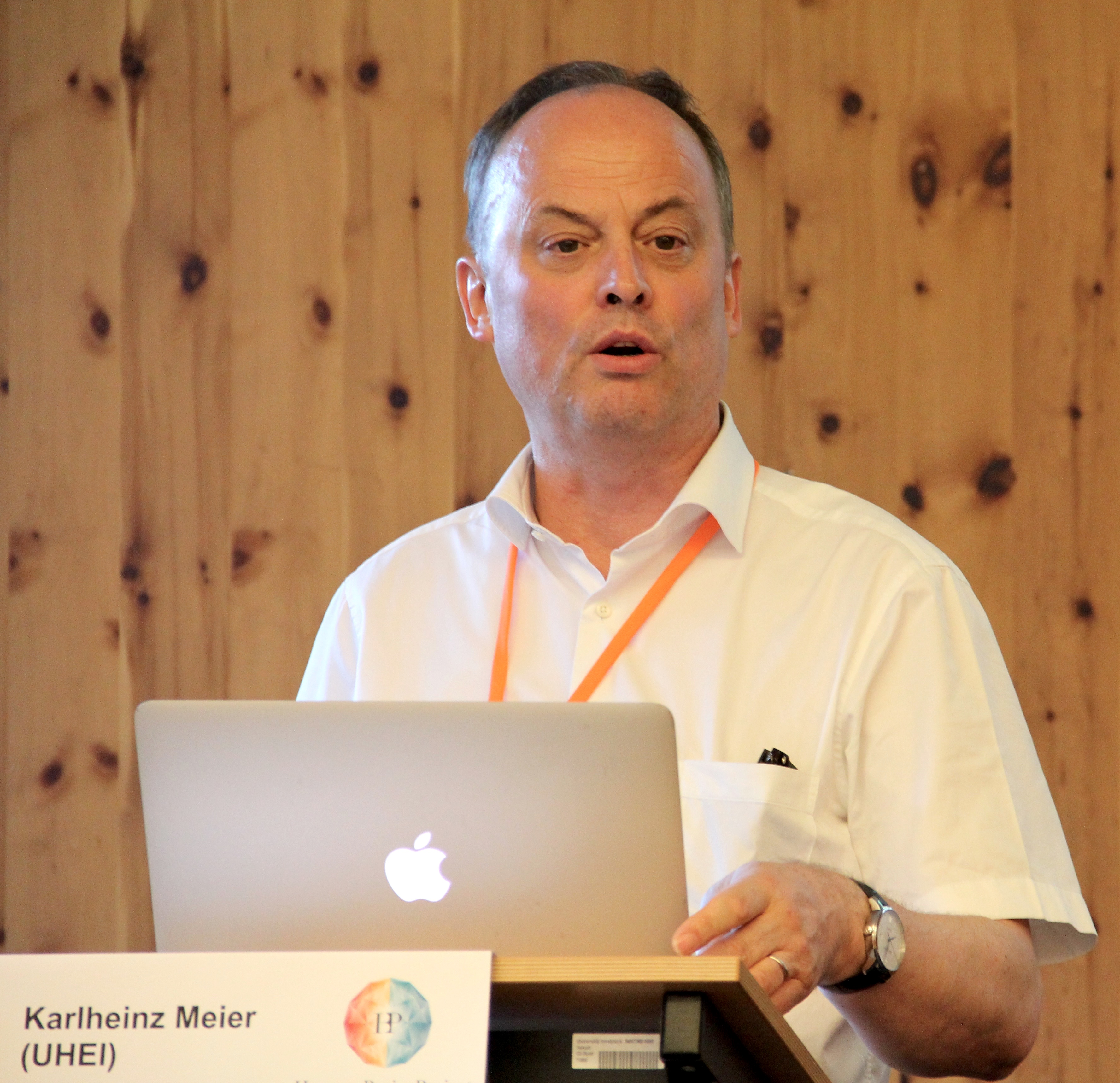 Prof. Dr: Karlheinz Meier, Ruprecht-Karls-Universität Heidelberg